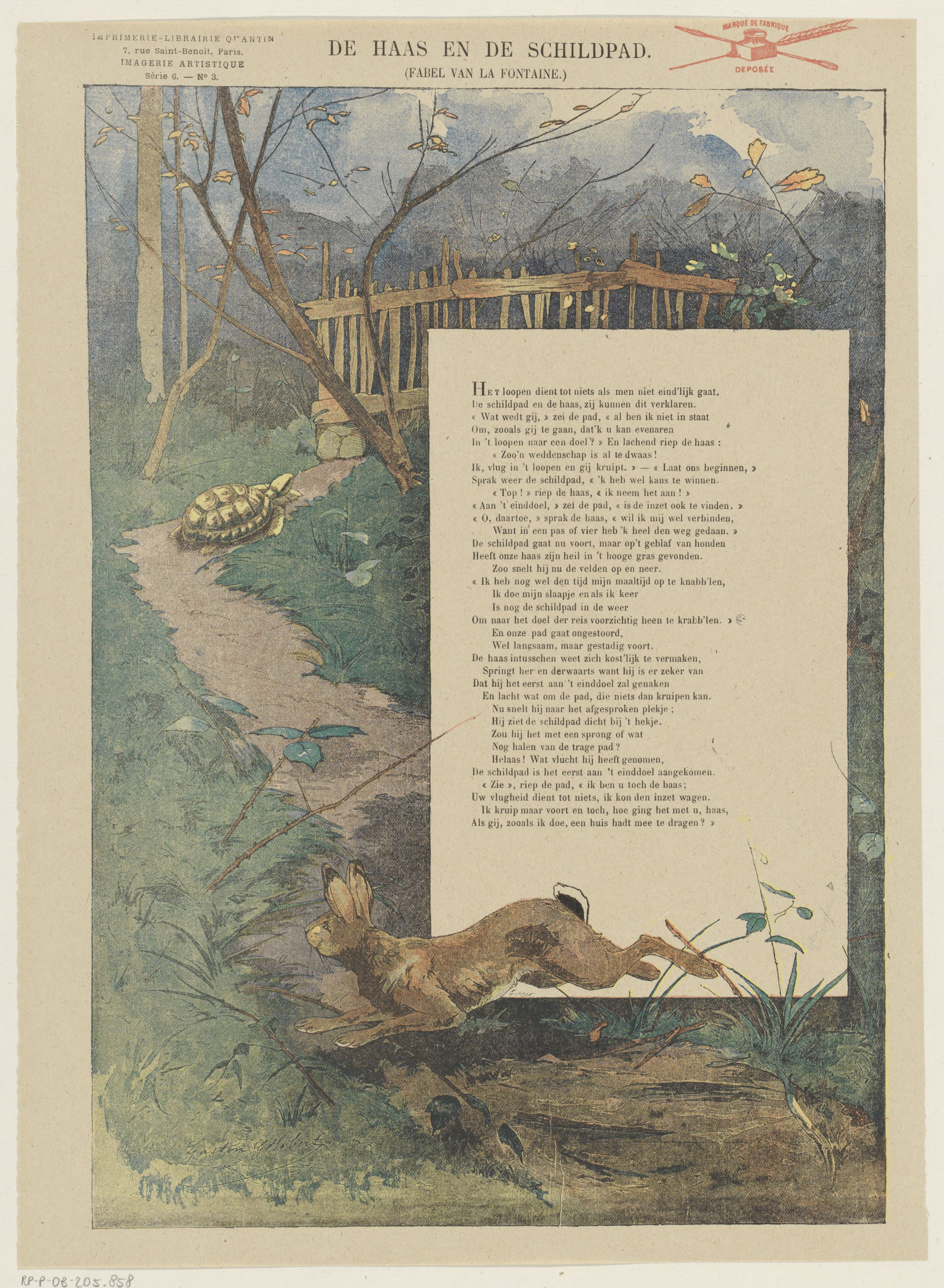 IdentificatieTitel(s): De haas en de schildpad (titel op object)Fabel van La Fontaine (serietitel op object)Imagerie Artistique / Série 6 (serietitel op object)Objecttype: prent volksprent Serienummer: 3/20Objectnummer: RP-P-OB-205.858Opschriften / Merken: verzamelaarsmerk, verso, gestempeld: Lugt 2760octrooivermelding, recto rechtsboven, gestempeld: ‘marque de fabrique / deposée’, rode stempel met inktpot, pen en schrijfveerOmschrijving: Blad met een grote voorstelling uit de fabel van Jean de La Fontaine, van de haas en de schildpad. Midden rechts een tekstblok met een vers. Genummerd linksboven: Série 6. - No. 3.VervaardigingVervaardiger: ontwerper: Gaston Gélibert (vermeld op object)prentmaker: anoniemuitgever: Albert Quantin (vermeld op object)Plaats vervaardiging: ParijsDatering: 1876 - 1890 en/of 1888Fysieke kenmerken: kleurenlithografie en tekst in boekdrukMateriaal: papier Techniek: kleurenlithografie (procedé) / boekdrukAfmetingen: blad: h 367 mm × b 268 mmOnderwerpWat: fabelstortoises, turtlesrodents: haredieren die zich als mensen gedragenVerwerving en rechtenCredit line: Schenking van de heer F.G. Waller, AmsterdamVerwerving: schenking 1923Copyright: Publiek domein